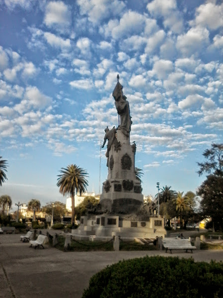 El Monumento a la Agricultura Nacional está enclavado en Plaza San Martín de Esperanza, Prov. de Santa Fe, República Argentina